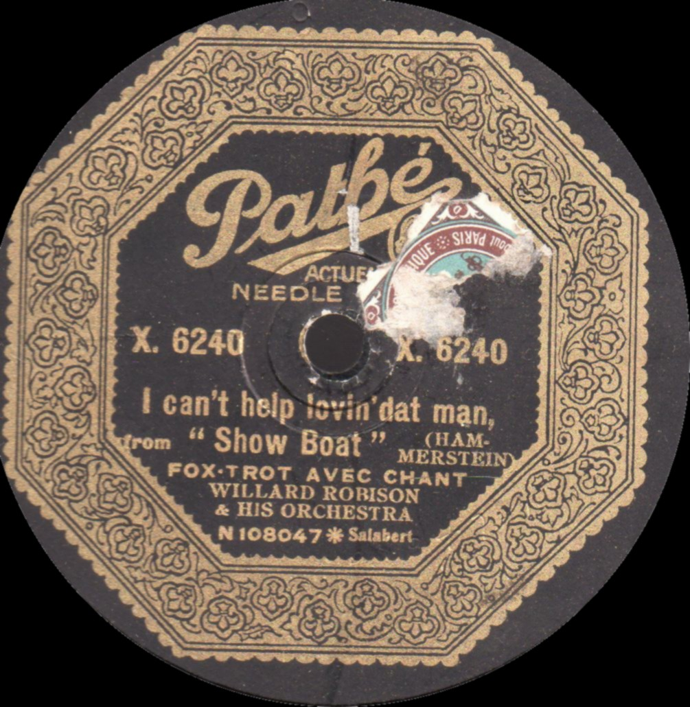 Disque Pathé Actuelle. Circa 1927/28.